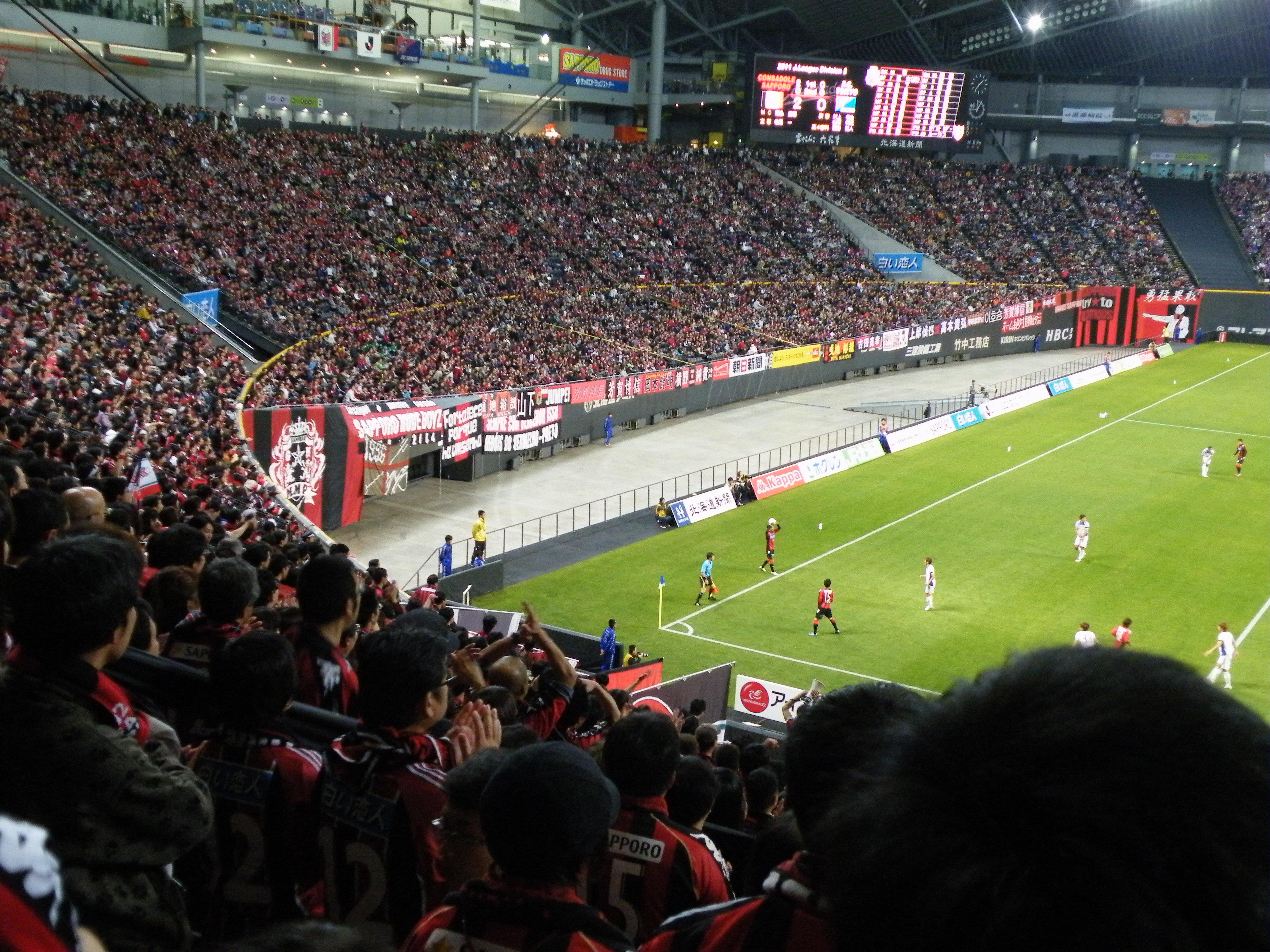 Jリーグディヴィジョン2第38節 札幌対FC東京（札幌ドーム）